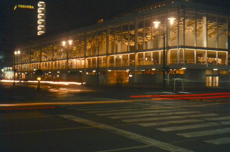 Oper- und Schauspielhaus Ffm bei Nacht etwa 1970